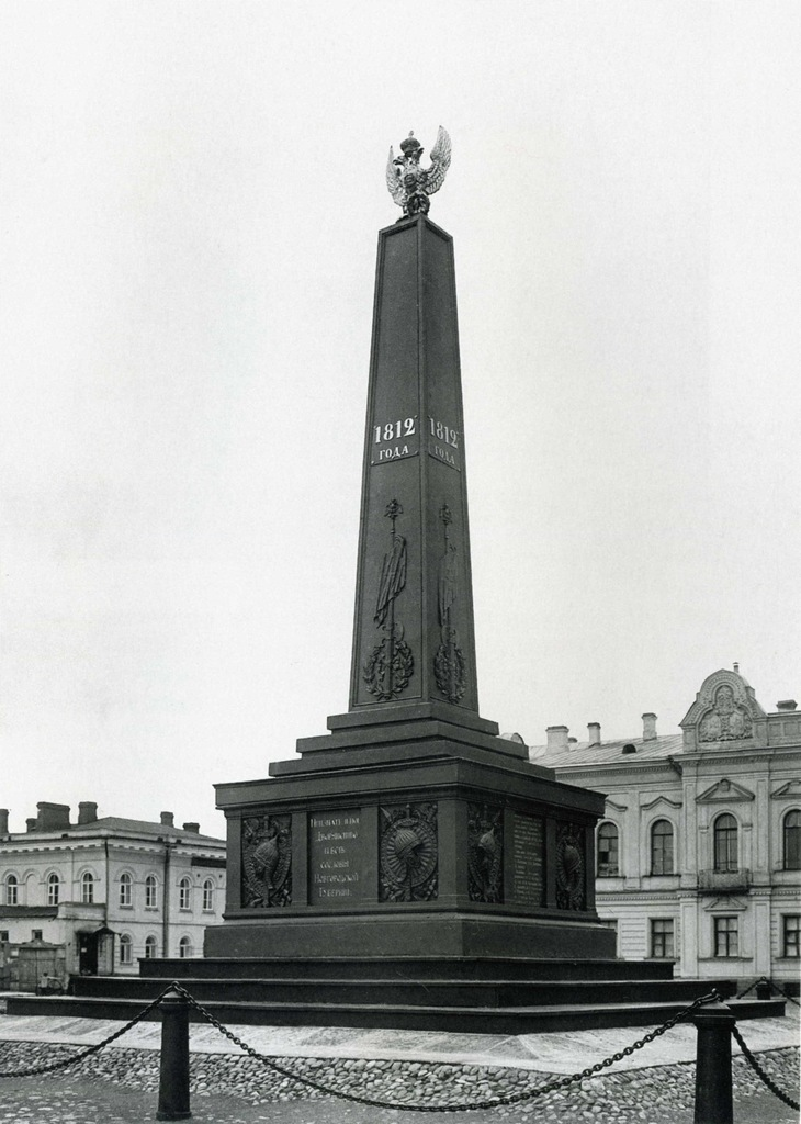 Памятник Новгородскому ополчению 1812года (Фото 1911г.)